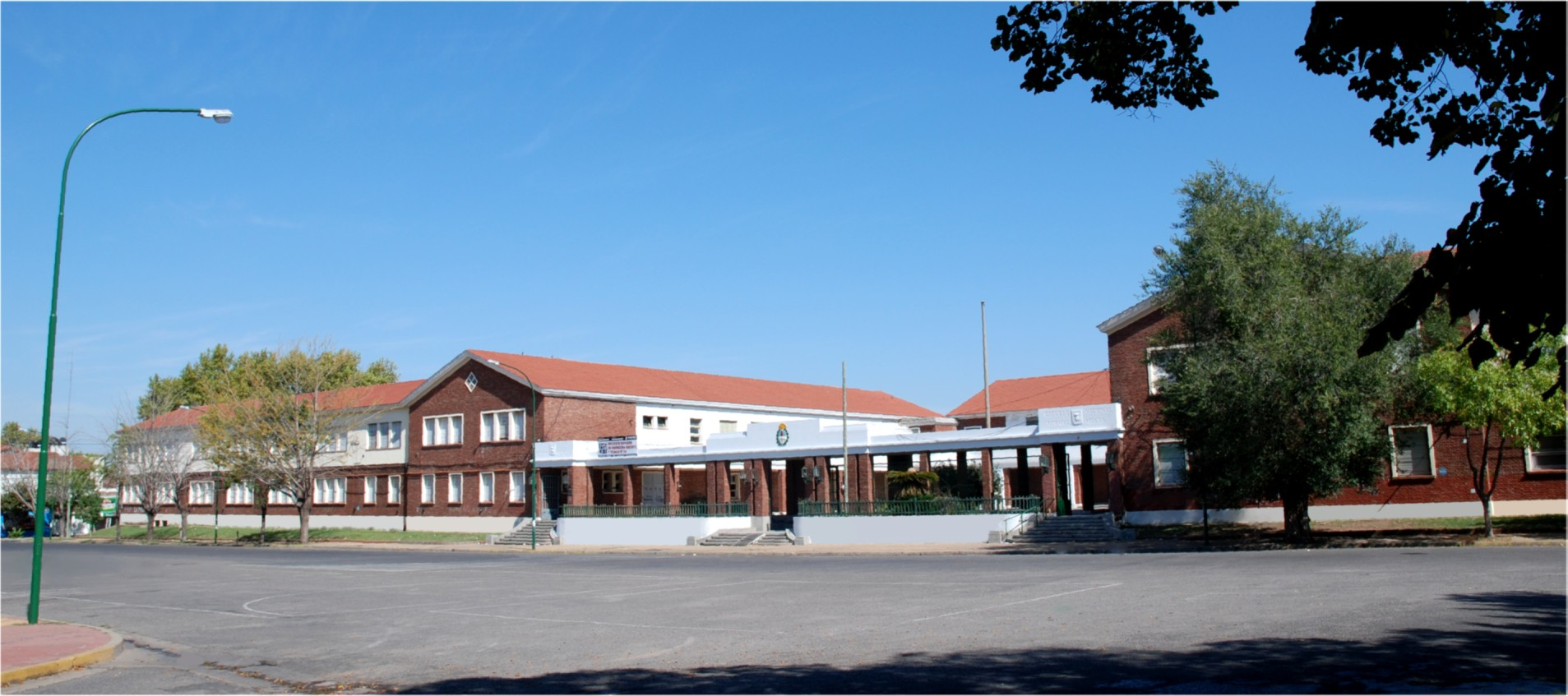 Escuelas de Educación Media Nº 6 y 9 (ex Colegios Normal y Nacional), Junín, Argentina.